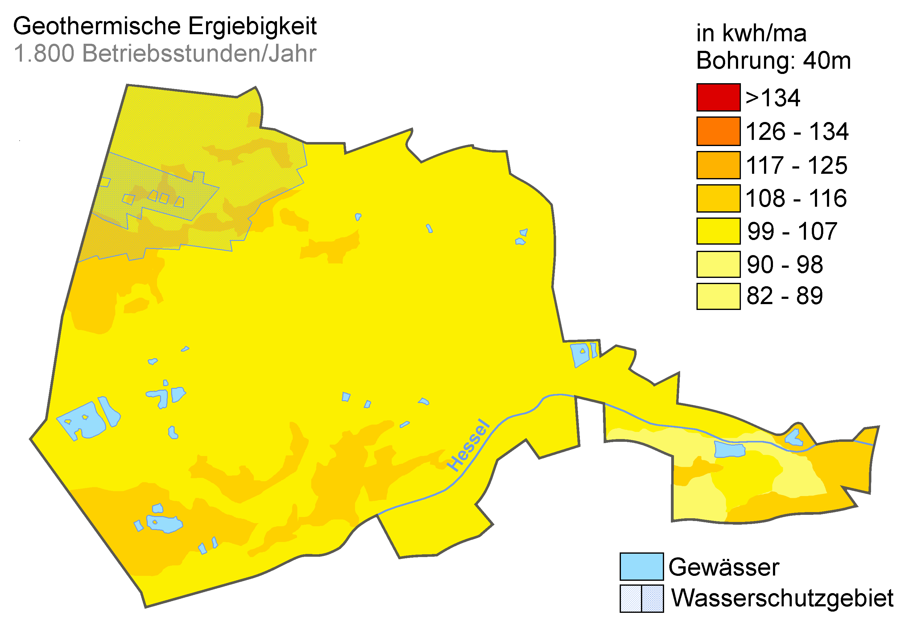 Geothermische Ergiebigkeit Peckelohs 2017